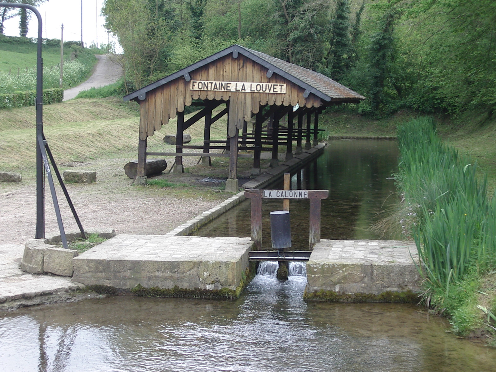 Lavoir de Fontaine-la-Louvet (France, Eure)